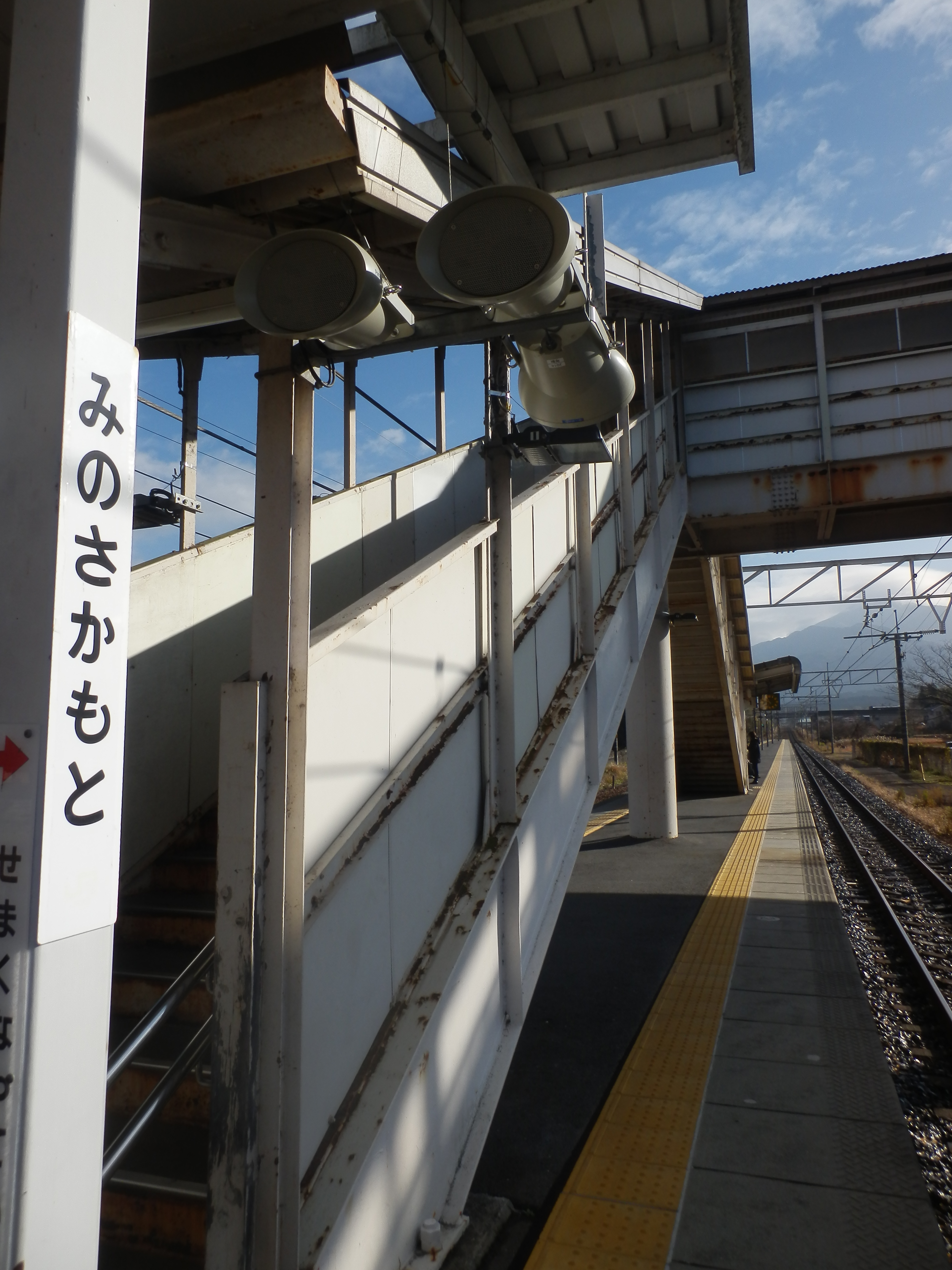 中央本線美濃坂本駅